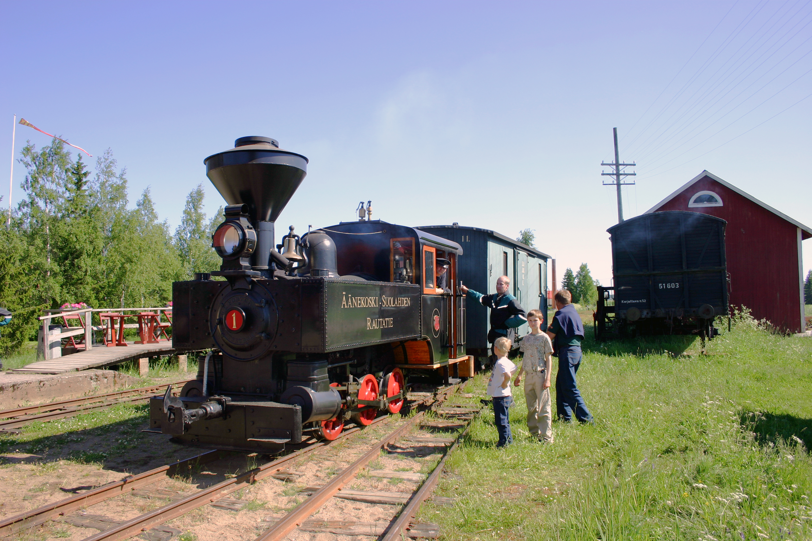 Äänekoski-Suolahden rautatien Porter-veturi